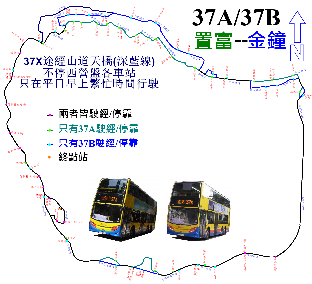 中文（香港）: 城巴37A線及37B線的走線圖，當中藍綠色表示只有37A駛經，而藍色則表示只有37B駛經，兩線組成一對環狀循環線